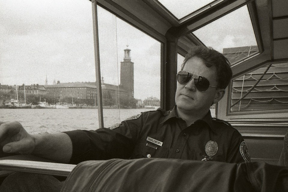 David Graf in Stockholm, Sweden. Stockholm City Hall in background.